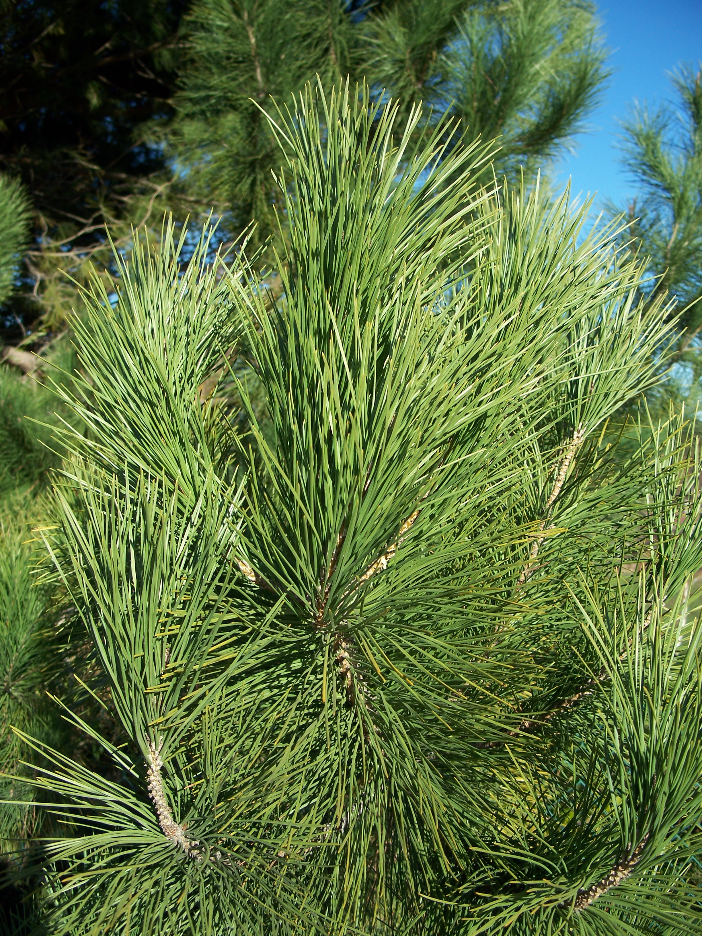 Pinus muricata Made in San Jose, California. Identified by MPF.